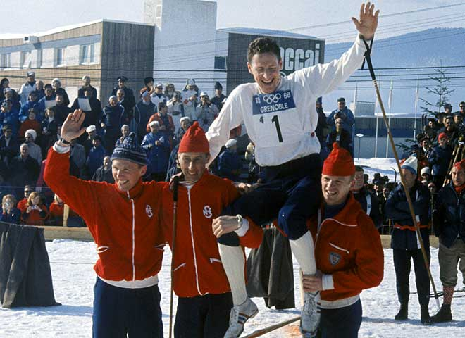 STAFETTVINNERE: Ole Ellefsæter (på topp), Odd Martinsen, Harald Grønningen og Pål Tyldum vant stafetten i Grenoble i 1968.